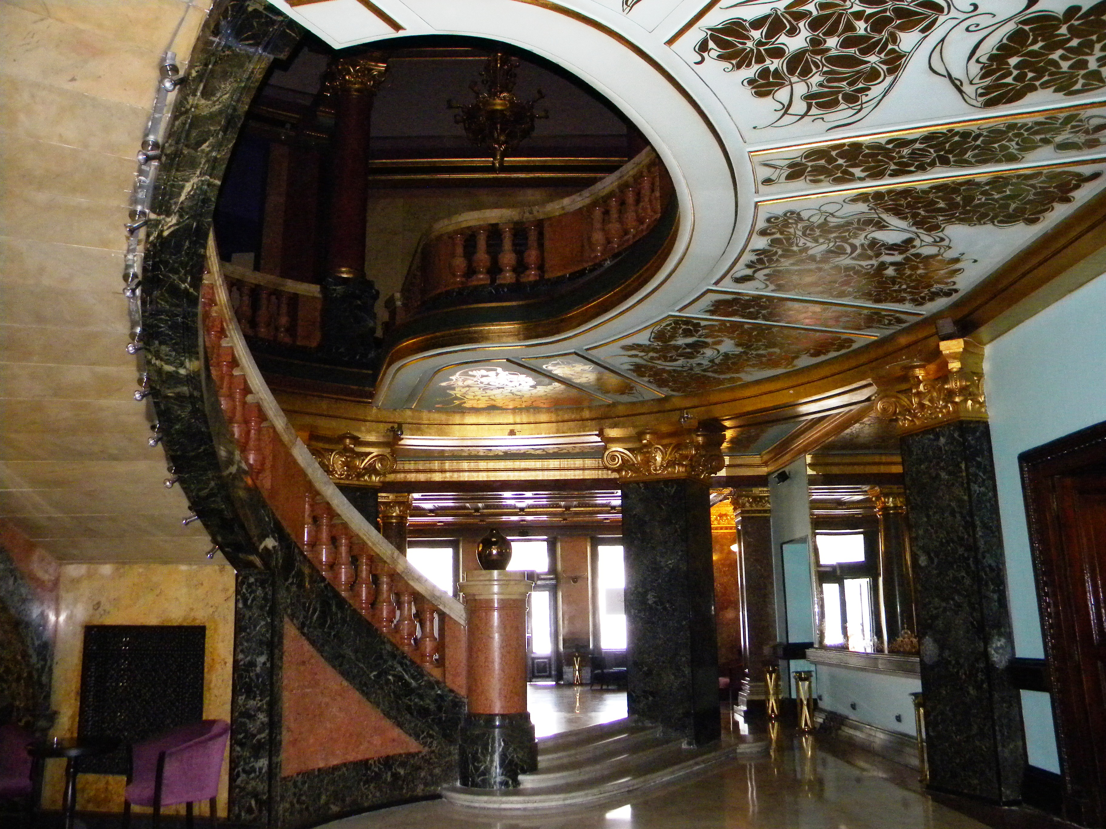 Bucuresti, Romania, Casa Vernescu, Calea Victoriei nr. 133, sect. 1, (holul 2)